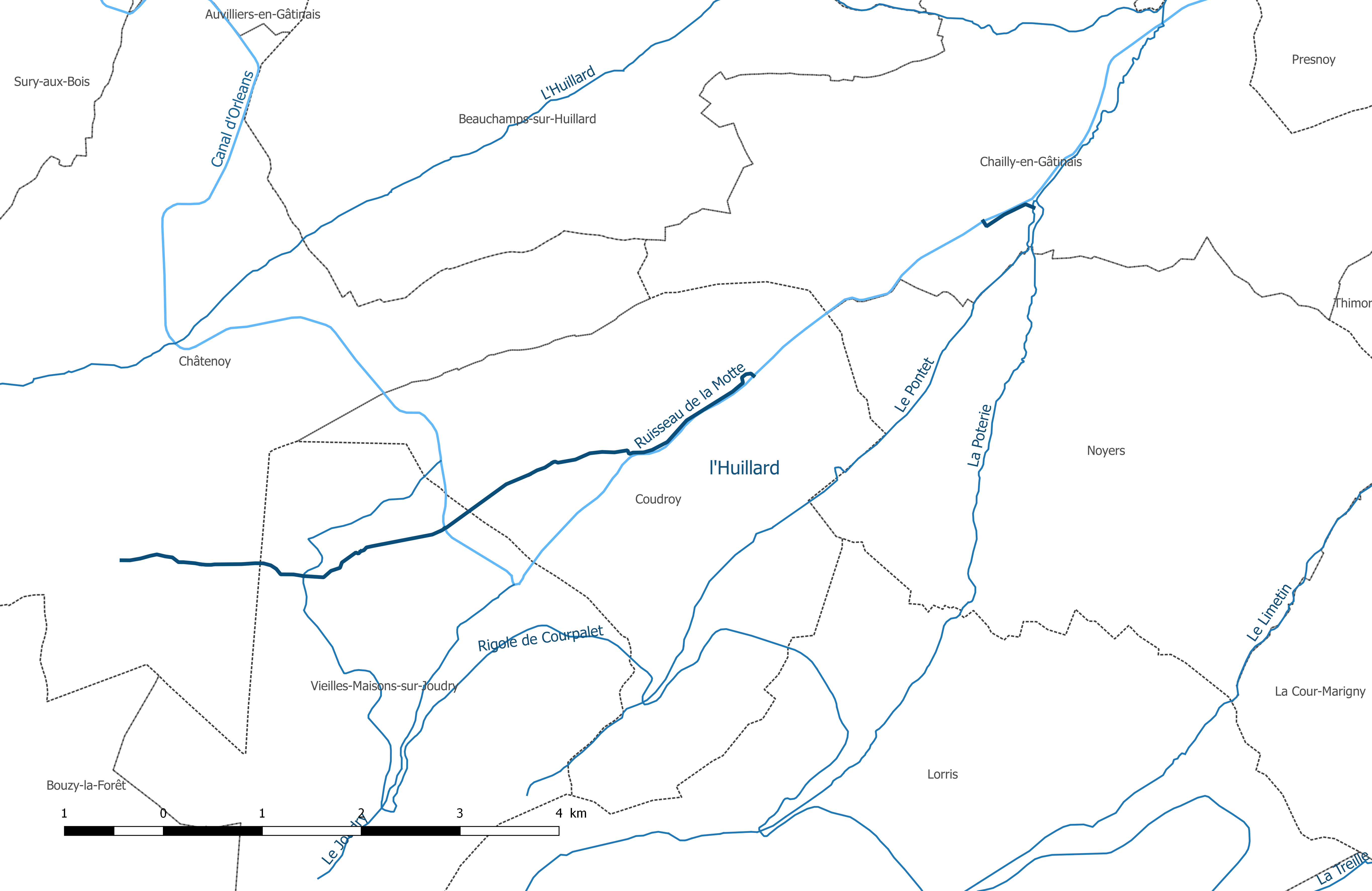 Carte du cours d'eau "le Ruisseau de la Motte", dans le département du Loiret.